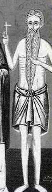 Particolare di un'icona bizantina raffigurante San Conone l'ortolano (morto nel circa250)